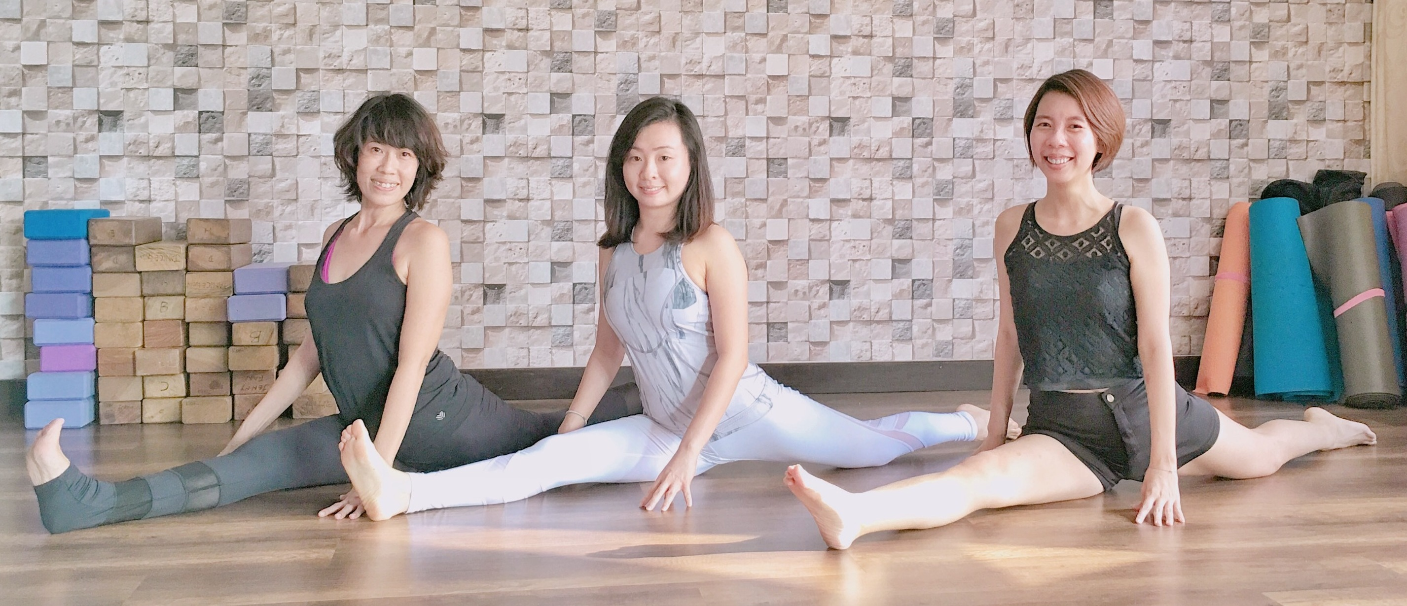 Asana, yoga 2017